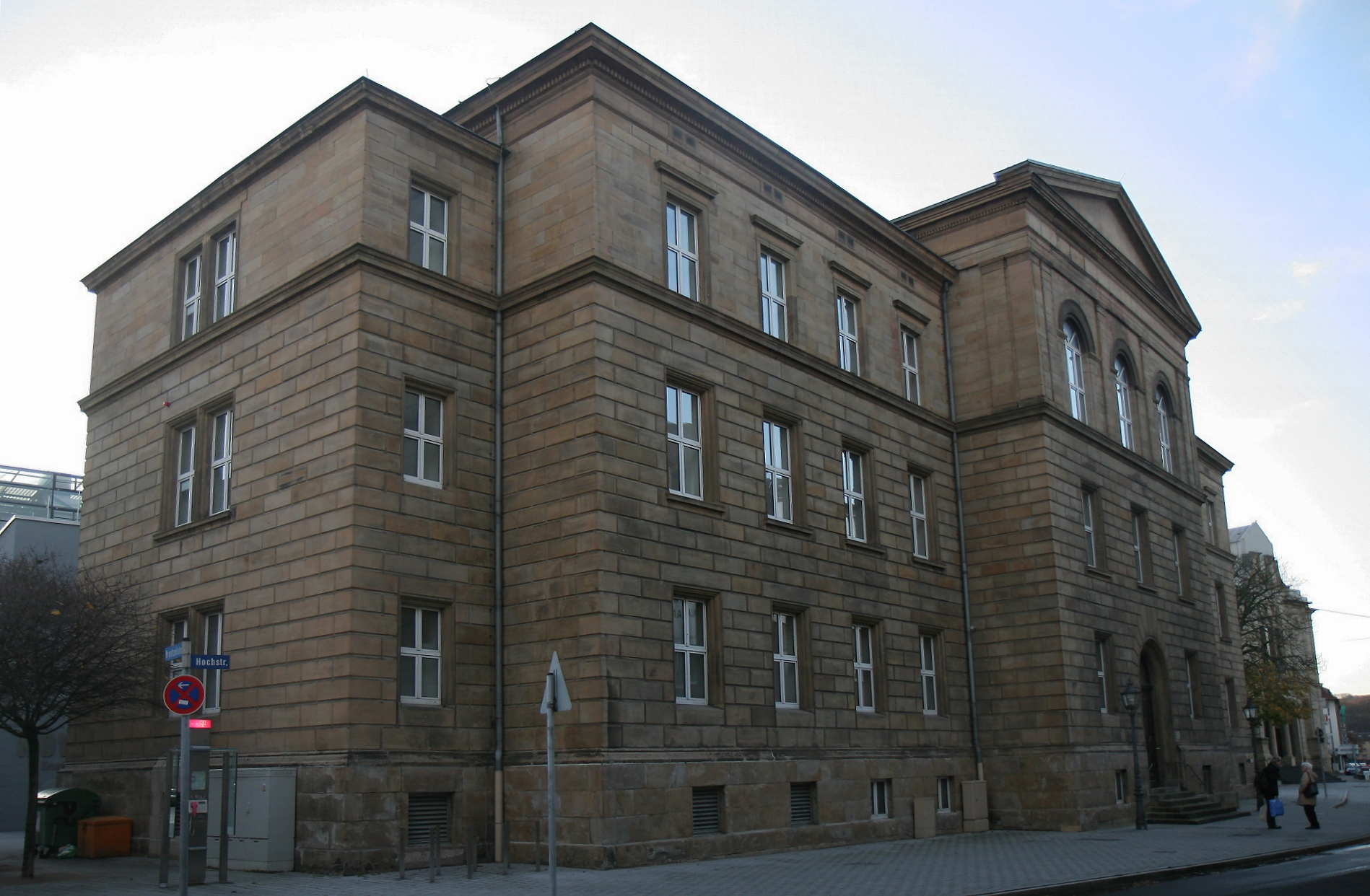 Gebäude des ehemaligen Kreisgerichts in Hagen, Hochstraße 71. Informationstafel am Gebäude: Ehemaliges Kreisgericht, erbaut 1863/66 von Carl Ferdinand Busse (1802-1868) Mitglied der Oberbaudeputation in Berlin und enger Mitarbeiter Karl Friedrich Schinkels (1781-1841). Vorläufig unter Denkmalschutz gestellt 1981. Restauriert nach den Originalplänen 1981/83.